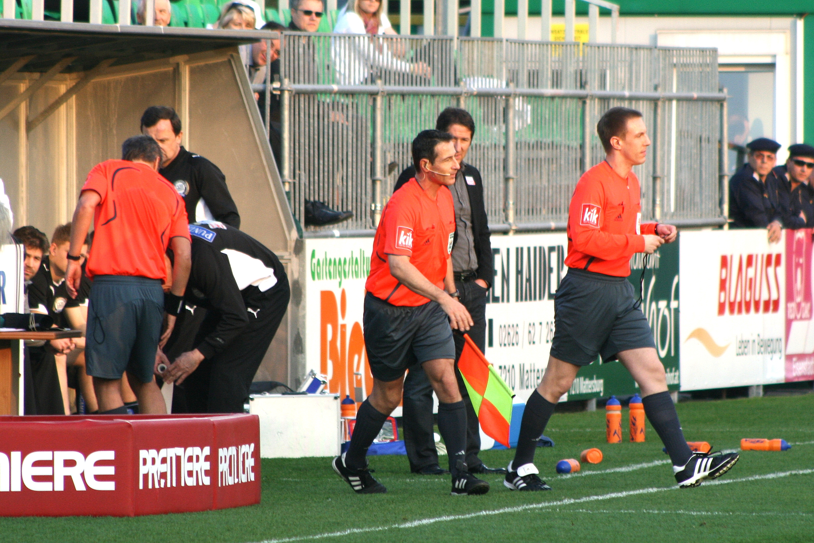 Michael Schmid, Fußballschiedsrichter - Im Bundesligaspiel SV Mattersburg gegen SK Sturm Graz musste der als 4. Offizieller eingeteilte Michael Schmid für Bernhard Brugger (links), der sich an der Wade verletzt hatte, ab der 33. Minute als Ersatzschiedsrichter aufs Feld und das Spiel leiten